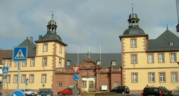 Schönborner Hof in Aschaffenburg, ein barockes Gebäude des 17. Jahrhunderts